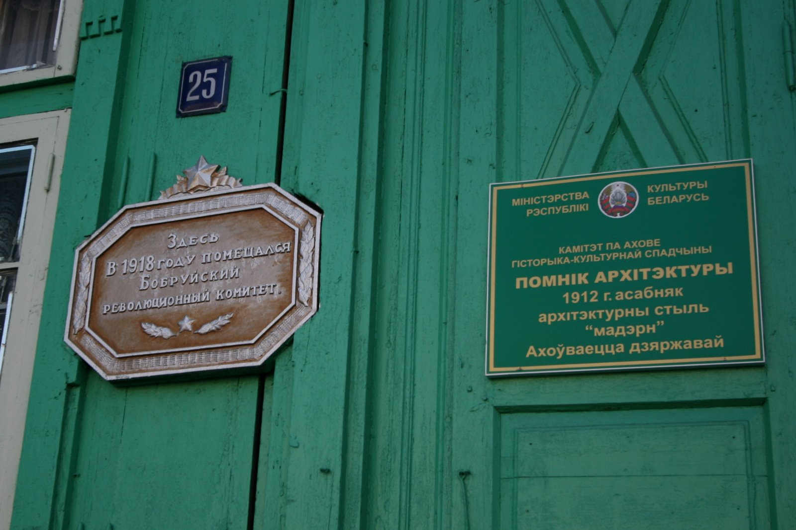 Babruysk